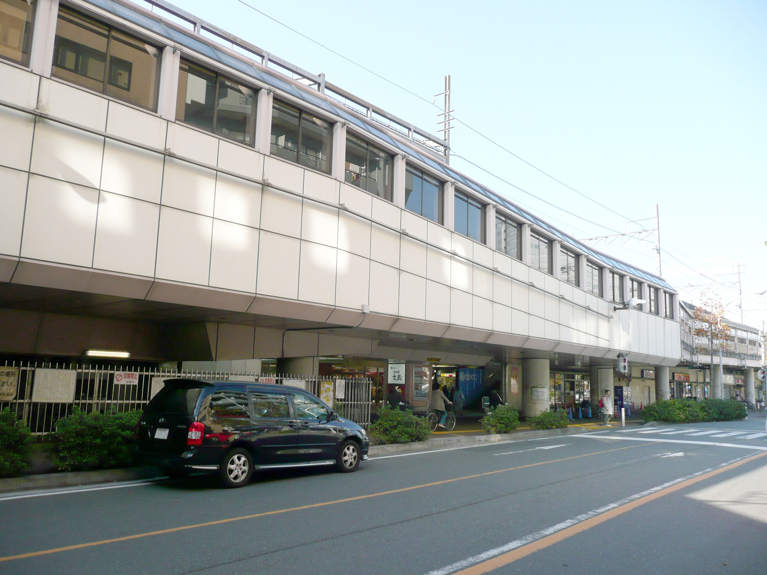 武蔵中原駅北口